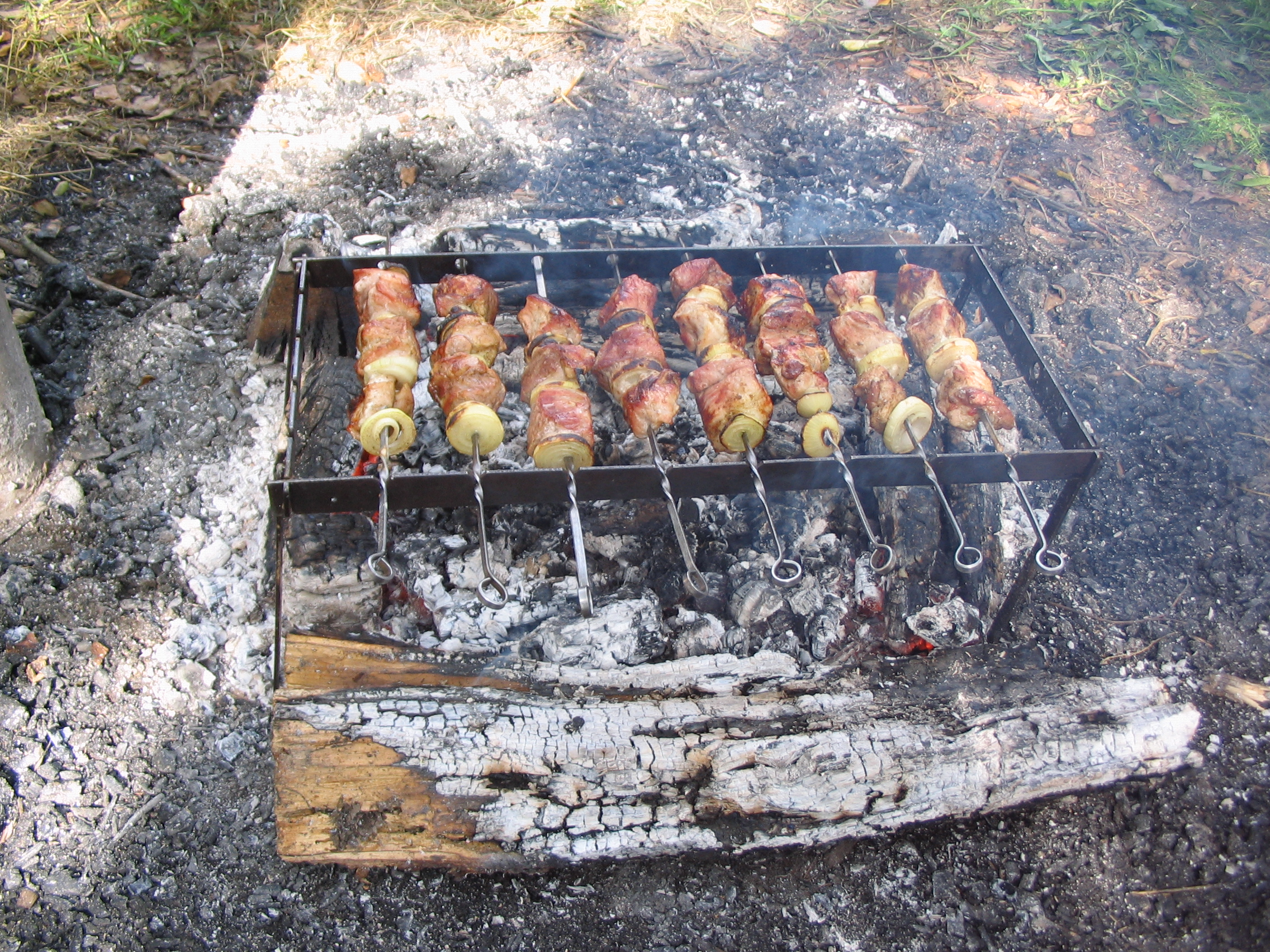 Туристический складной мангал